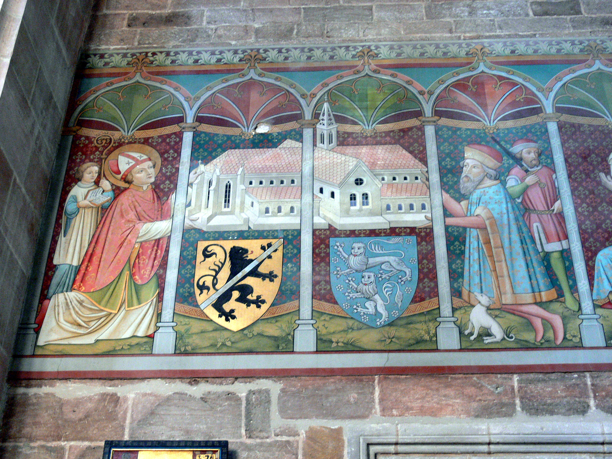 Münster in Heilsbronn. Stiftungsbild ( 15.Jhdt.): Bischof Otto von Bamberg trägt mit Graf Rapoto von Abenberg, dem ersten Abt des Klosters, ein Modell des Münsters.